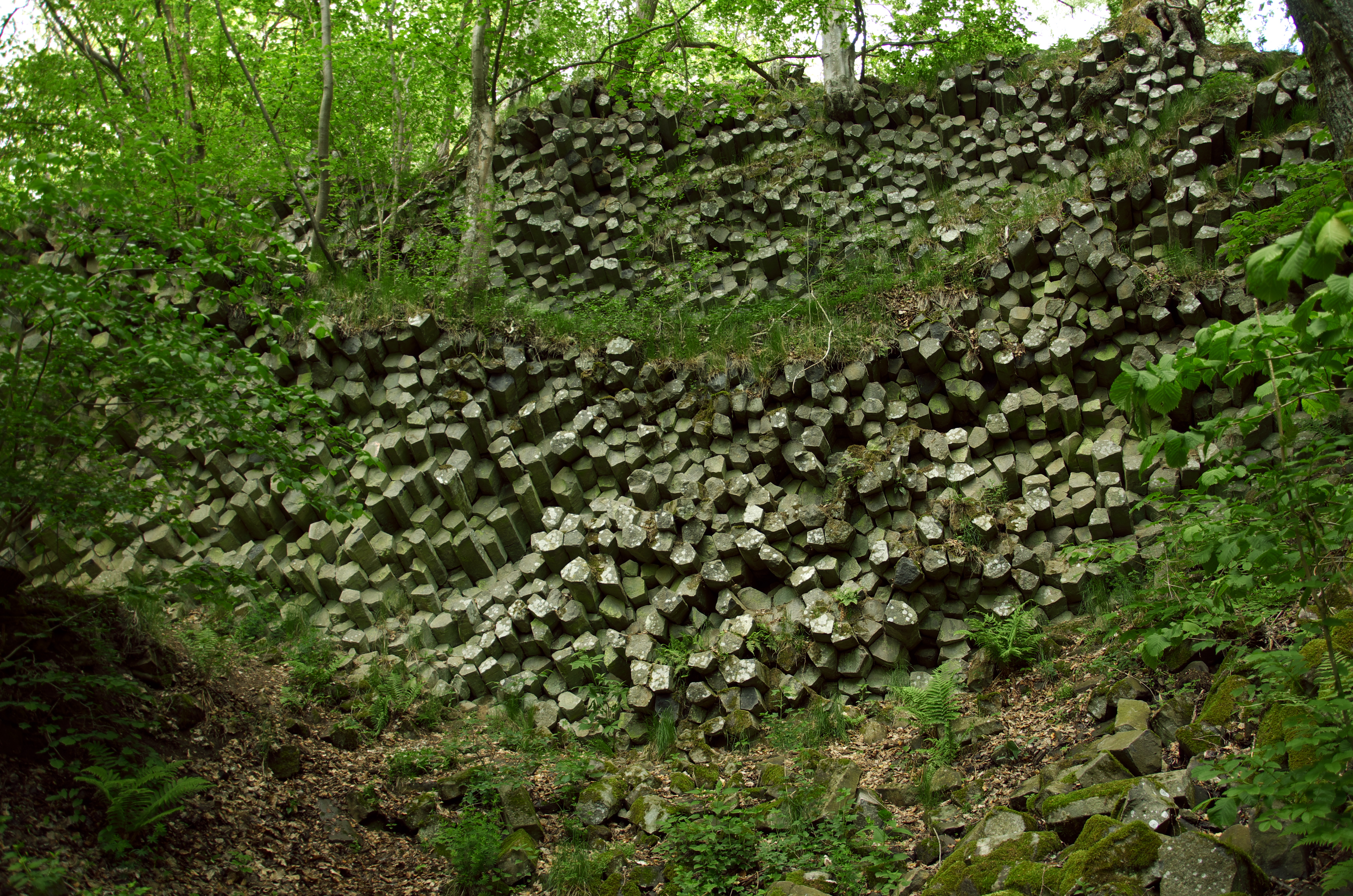 Basaltprismenwand im Naturschutzgebiet „Gangolfsberg“ (Bayern)